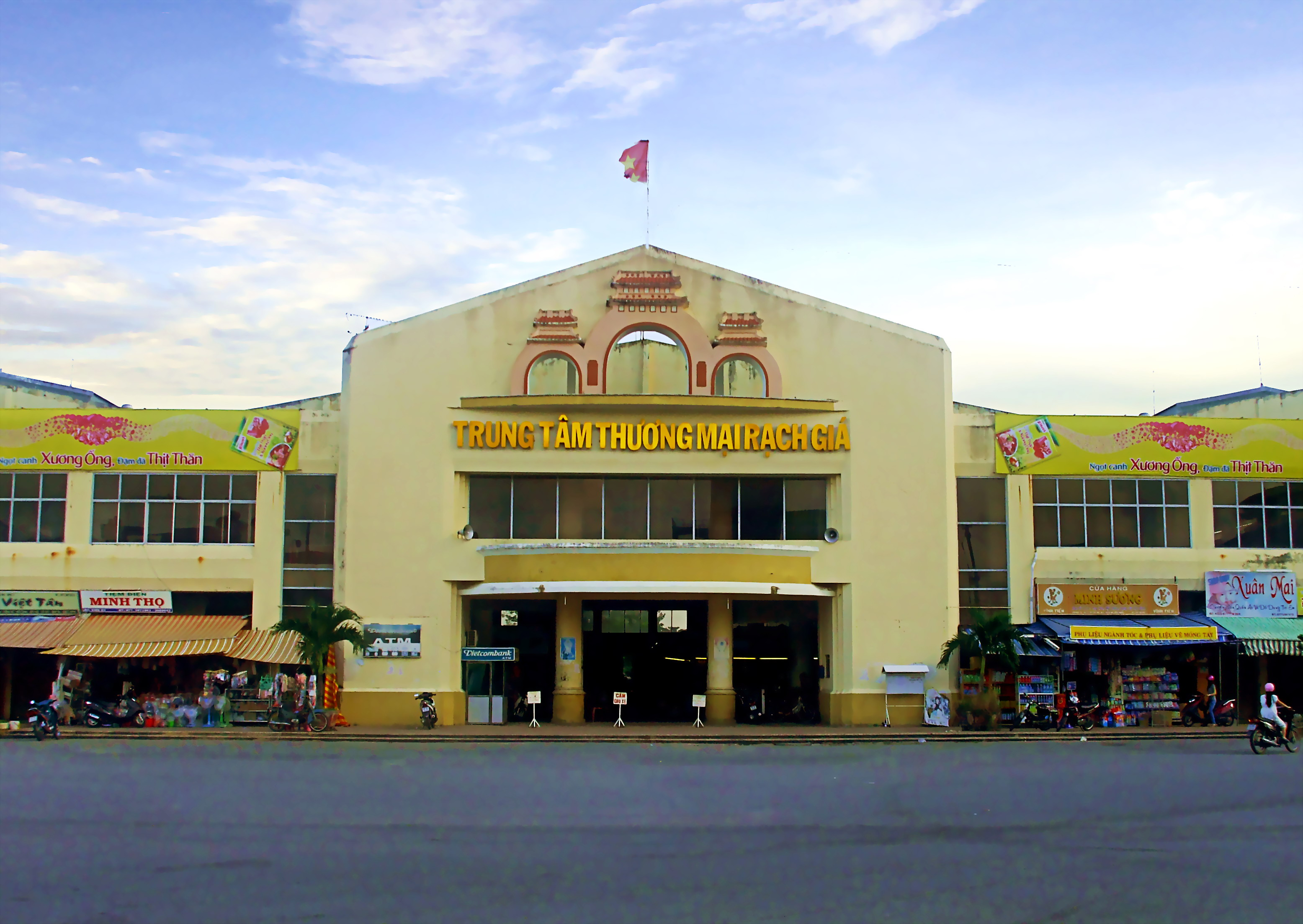 Trung tâm thương mại Rạch Giá (Kiên Giang, Việt Nam).